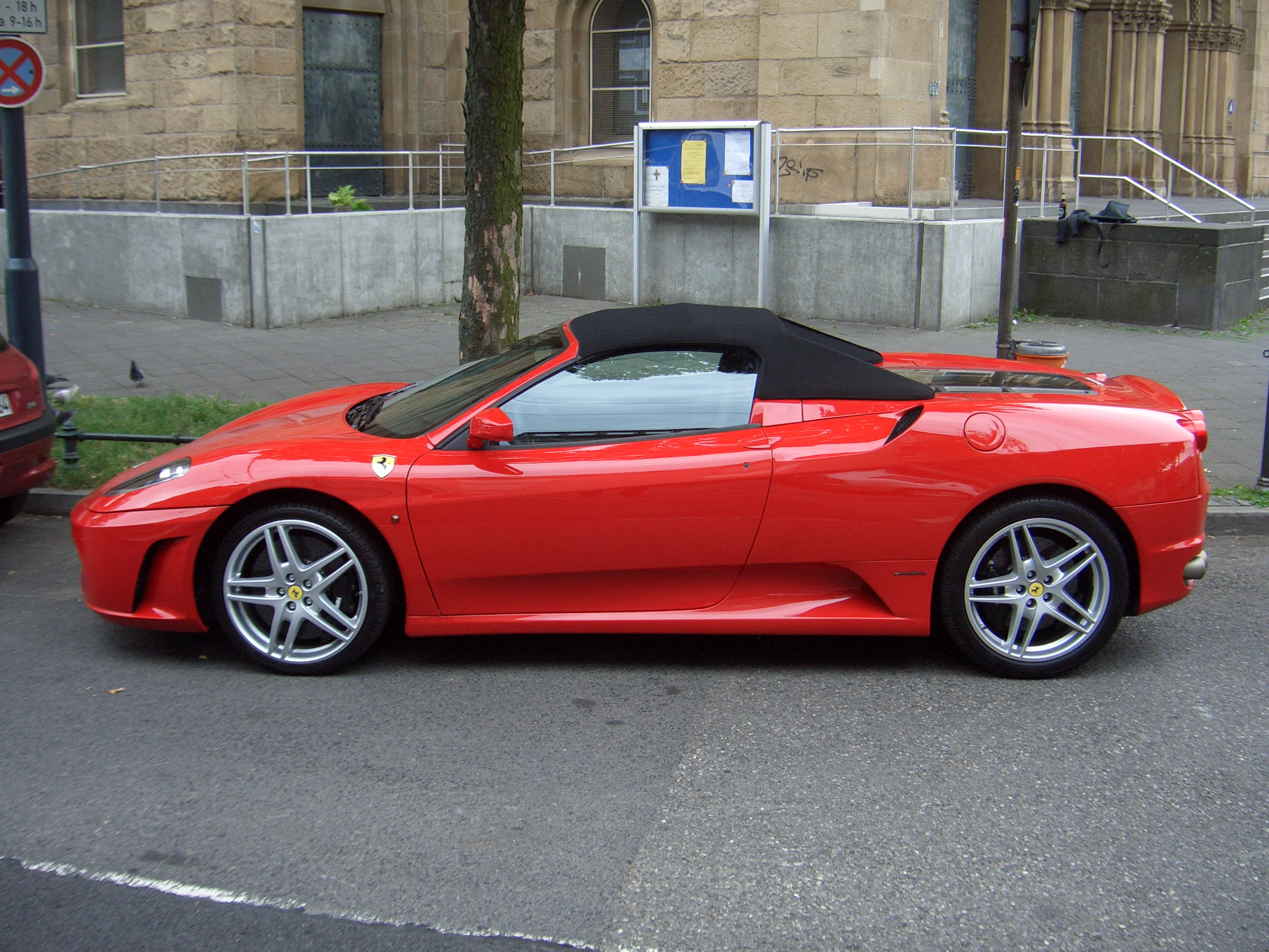 Ferrari F430 Spider, from 2004, seen in Duesseldorf, Germany